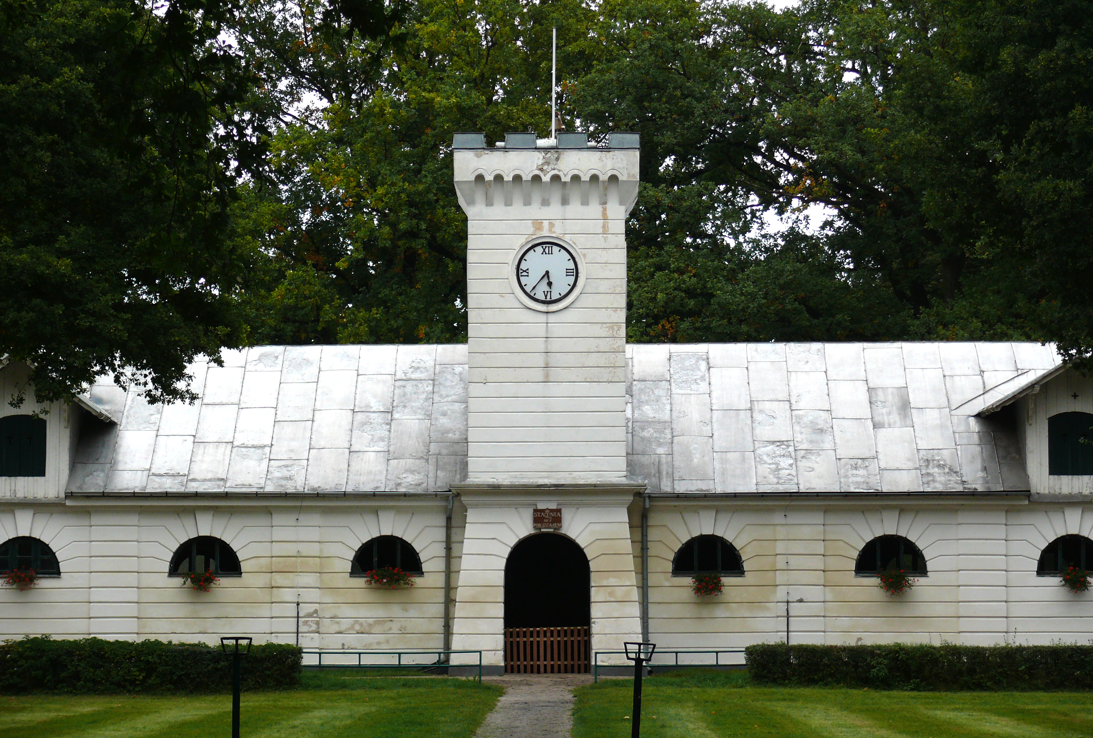 Założenie krajobrazowo-przestrzenne stadniny koni (1 poł. XIX): - Stajnia "Zegarowa" (1841r.) - Wygoda, gmina Janów Podlaski, powiat bialski, woj. lubelskie, (Zabytek nr. A/76 z 25.11.1966 i z 28.12.1983)